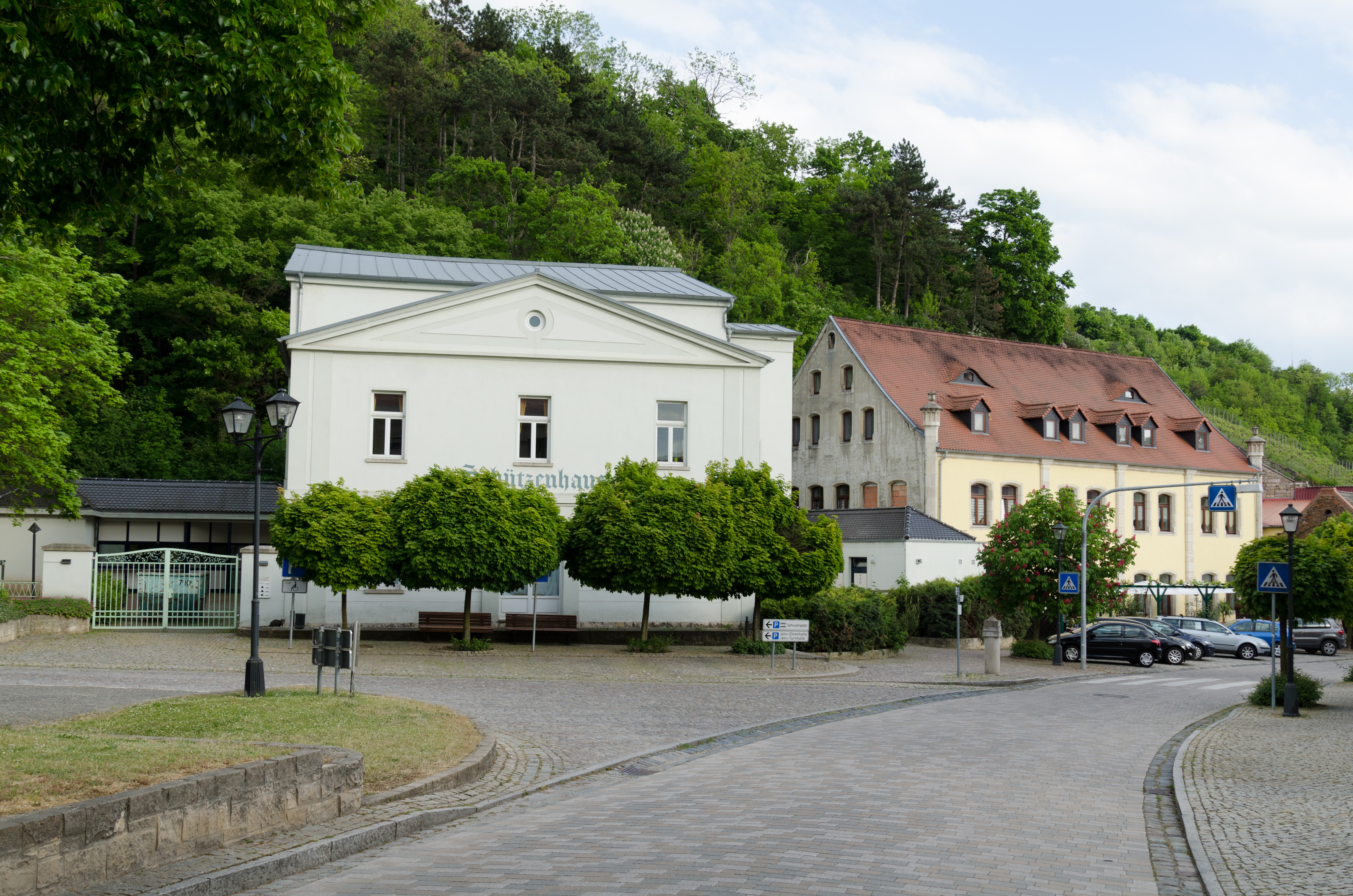 Freyburg an der Unstrut, Schützenstraße 6, 5